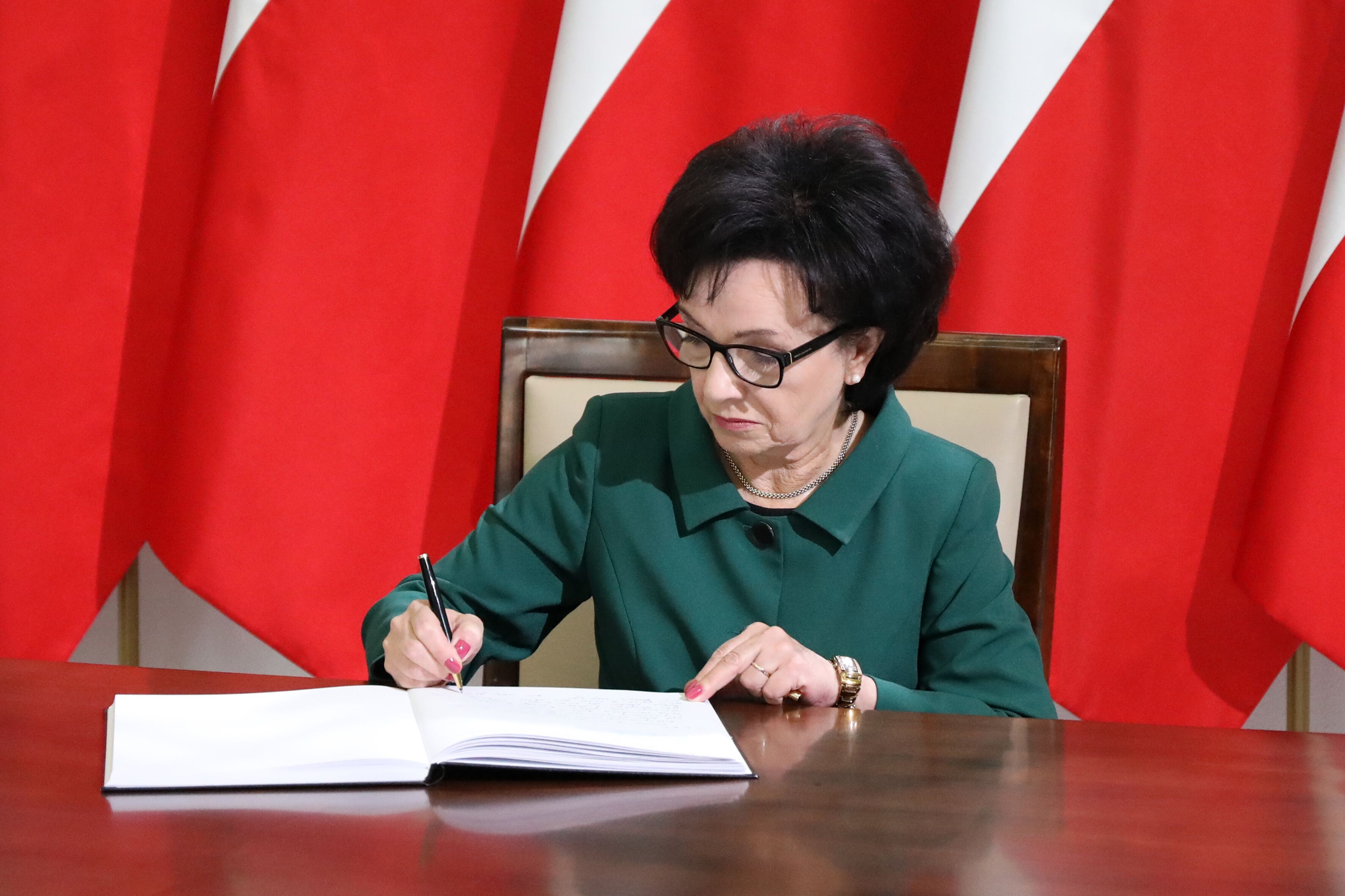 Wpis Marszałek Sejmu do księgi kondolencyjnej po śmierci Marszałka Seniora Kornela Morawieckiego [03.10.2019]